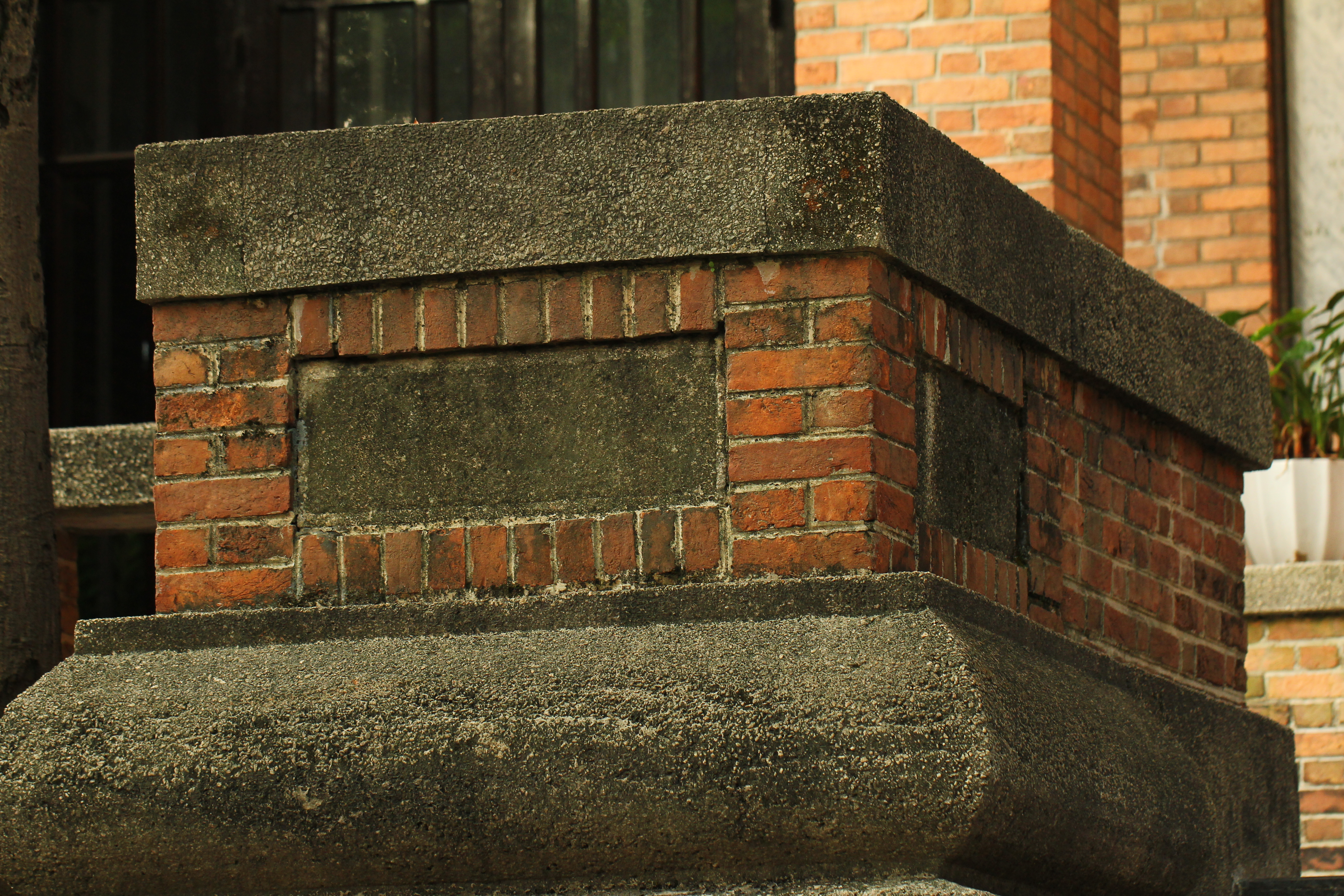 中山大學格蘭堂門前石柱。原為燈座，後被拆走，石刻「GRANT HALL」也被鑿去。